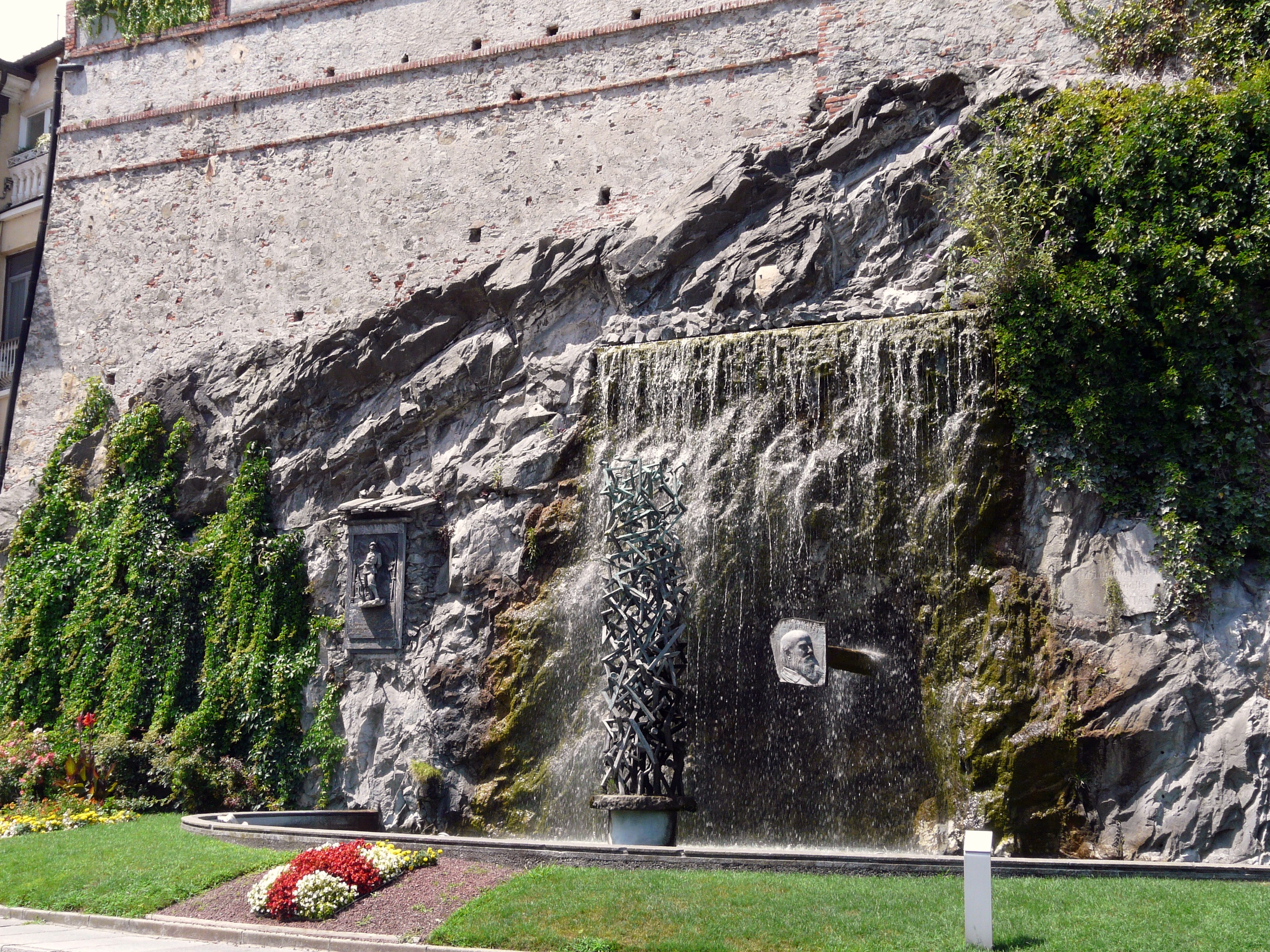 Monumento-fontana a Camillo Olivetti, Ivrea, Piemonte, Italia